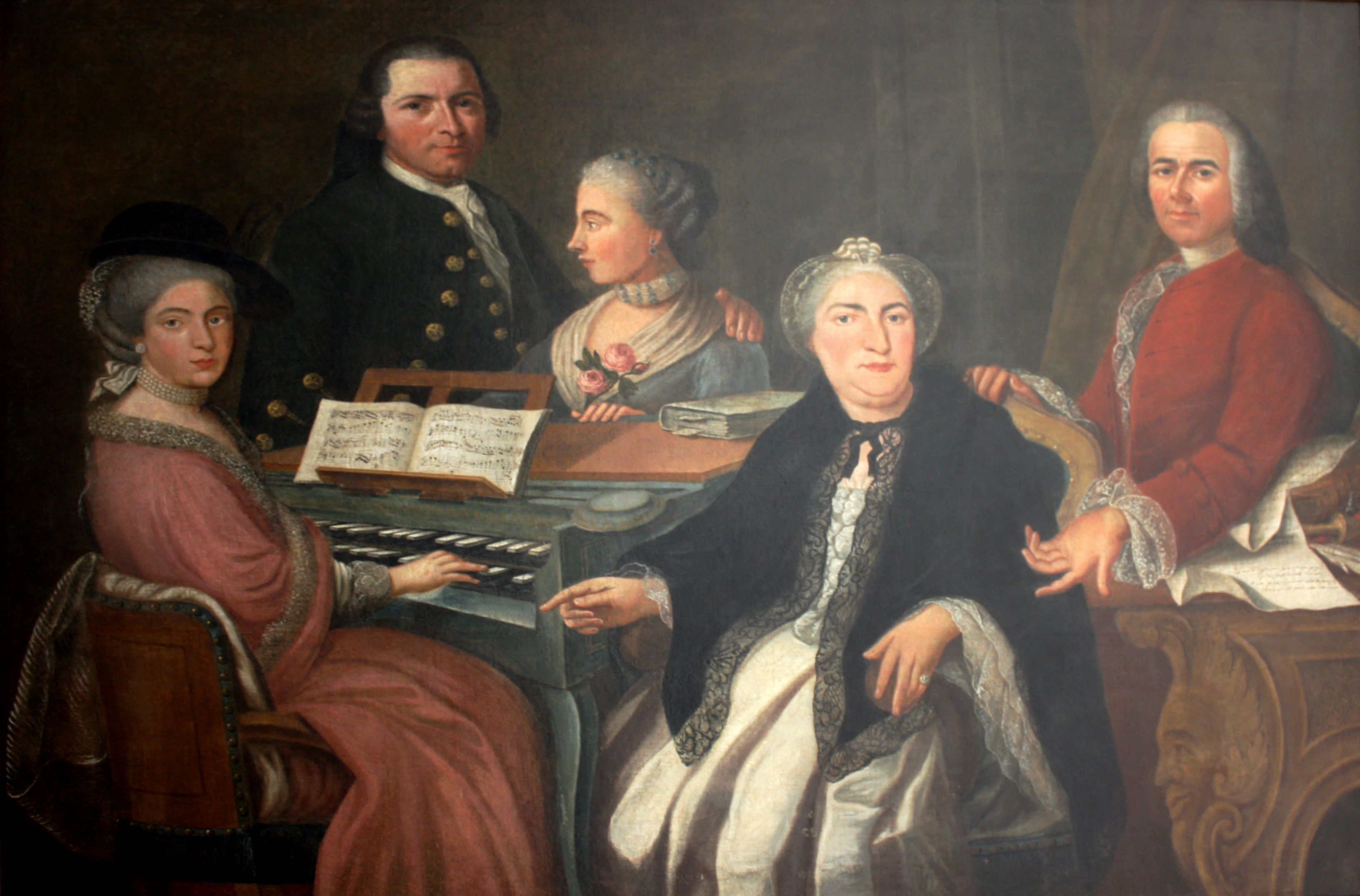 Karl Joseph Riepp (1710–1775) mit seiner Familie, Gemälde im Klostermuseum Ottobeuren